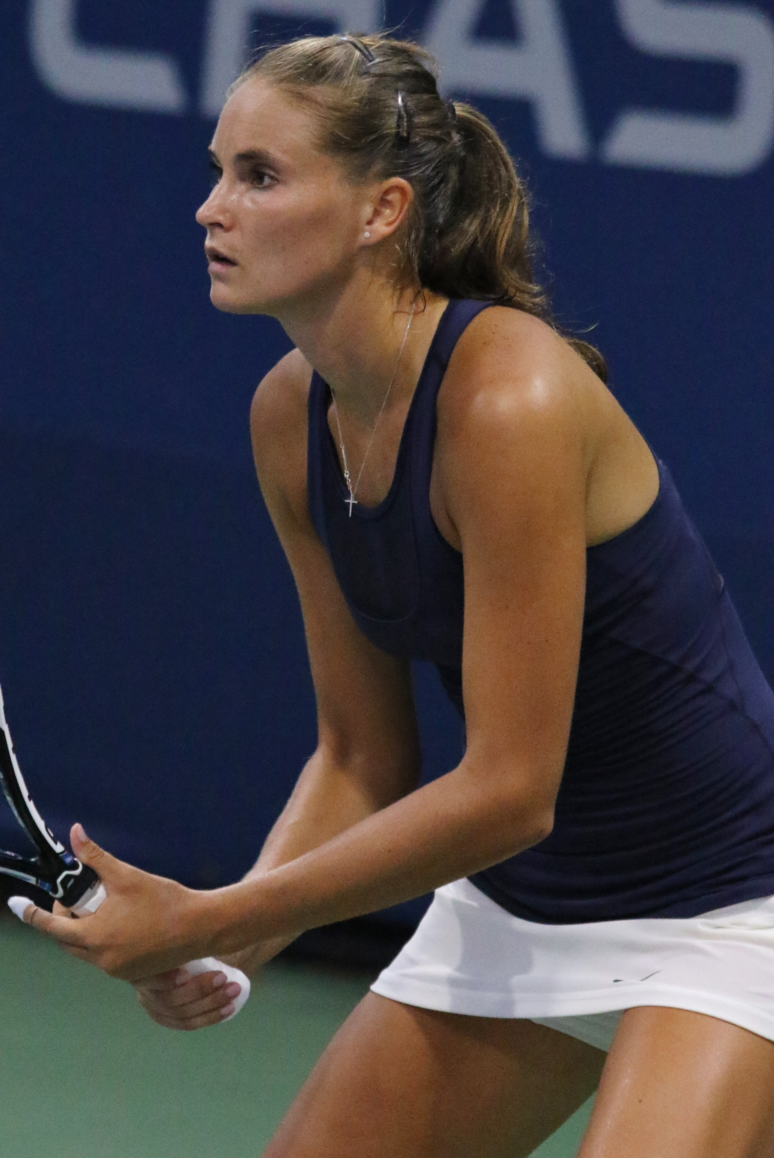 Panova US16 (5)